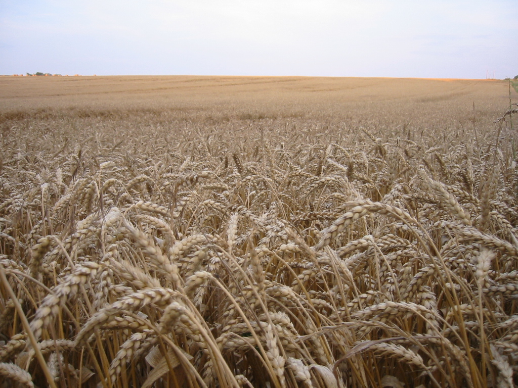 Champs de blé en Bourgogne